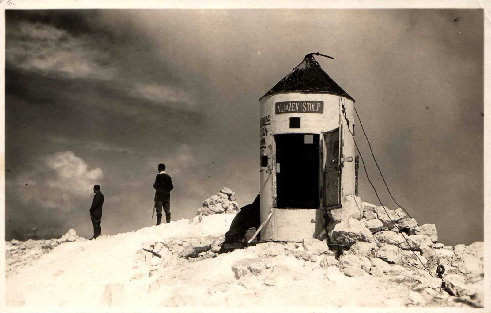 Razglednica Aljaževega stolpa.